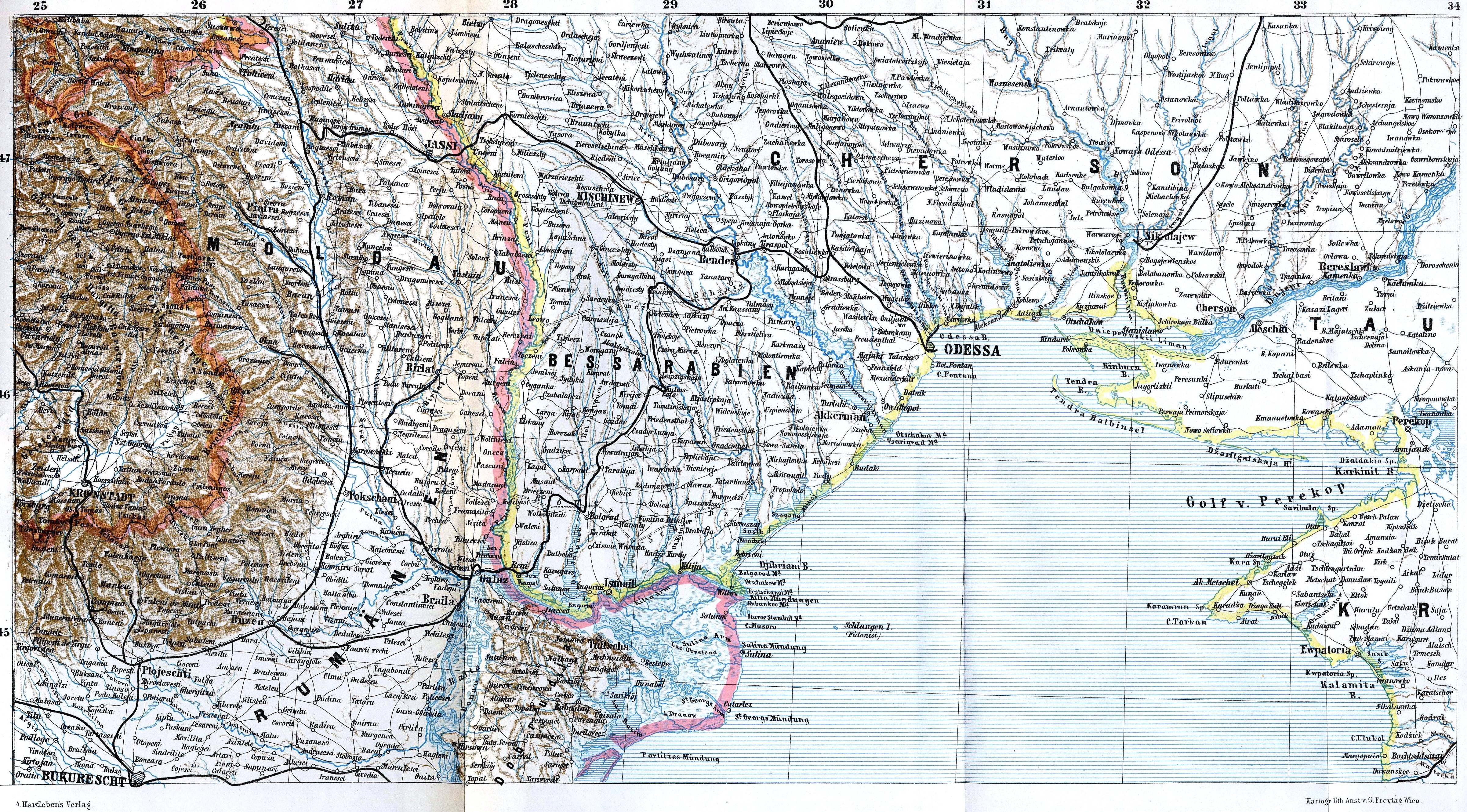 Nord-vestul bazinului Pontic la sfârşitul secolului XIX